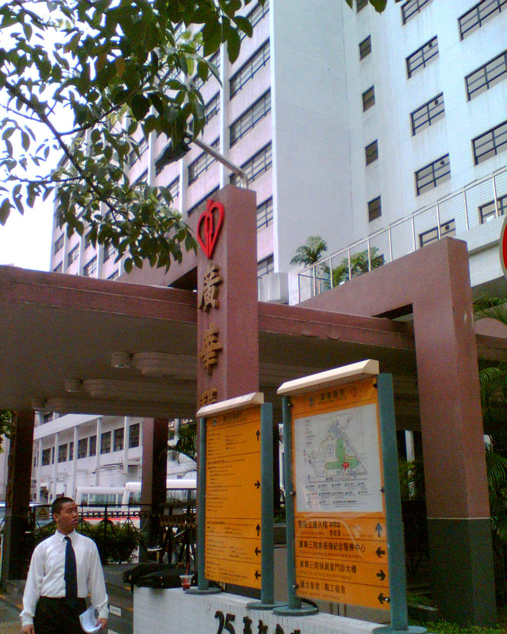 廣華醫院